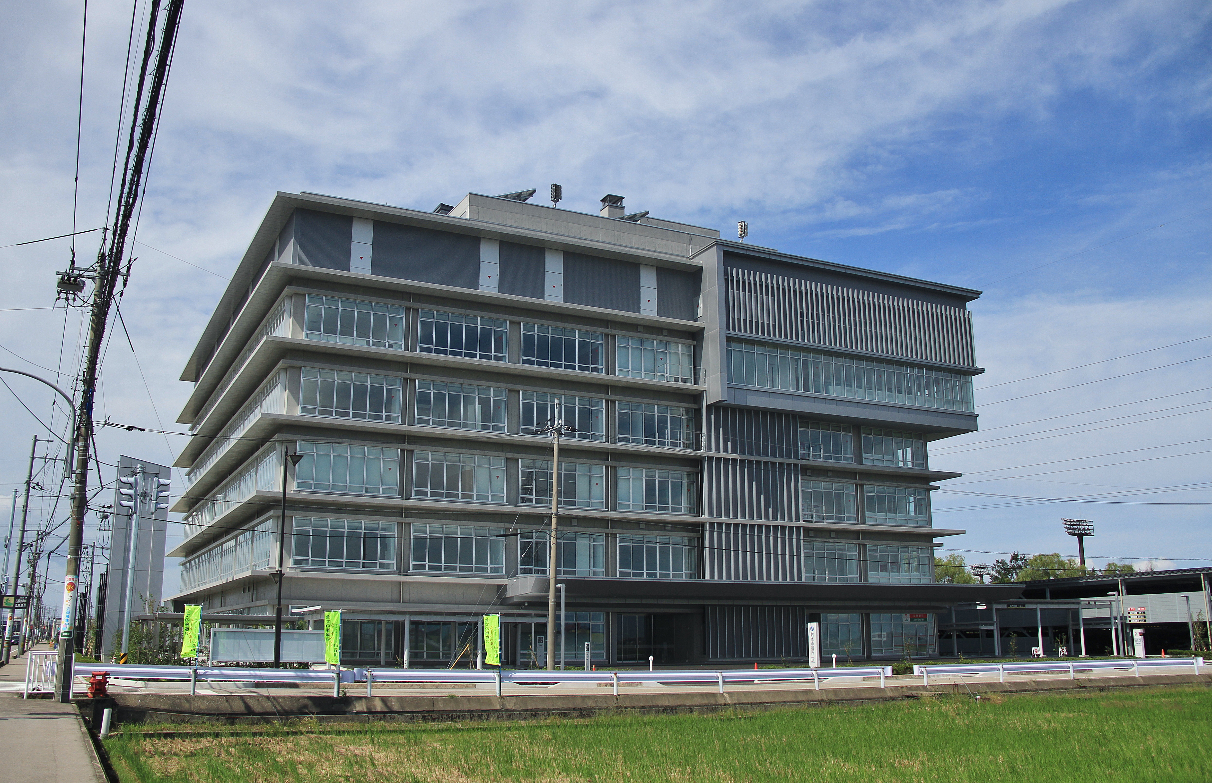 射水市役所